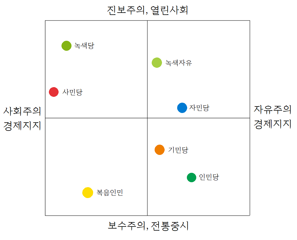 스위스 정당의 정치적 좌표, 영문 위키백과 참조 표 작성 (File:Swiss_party_politics_2007_en.png)